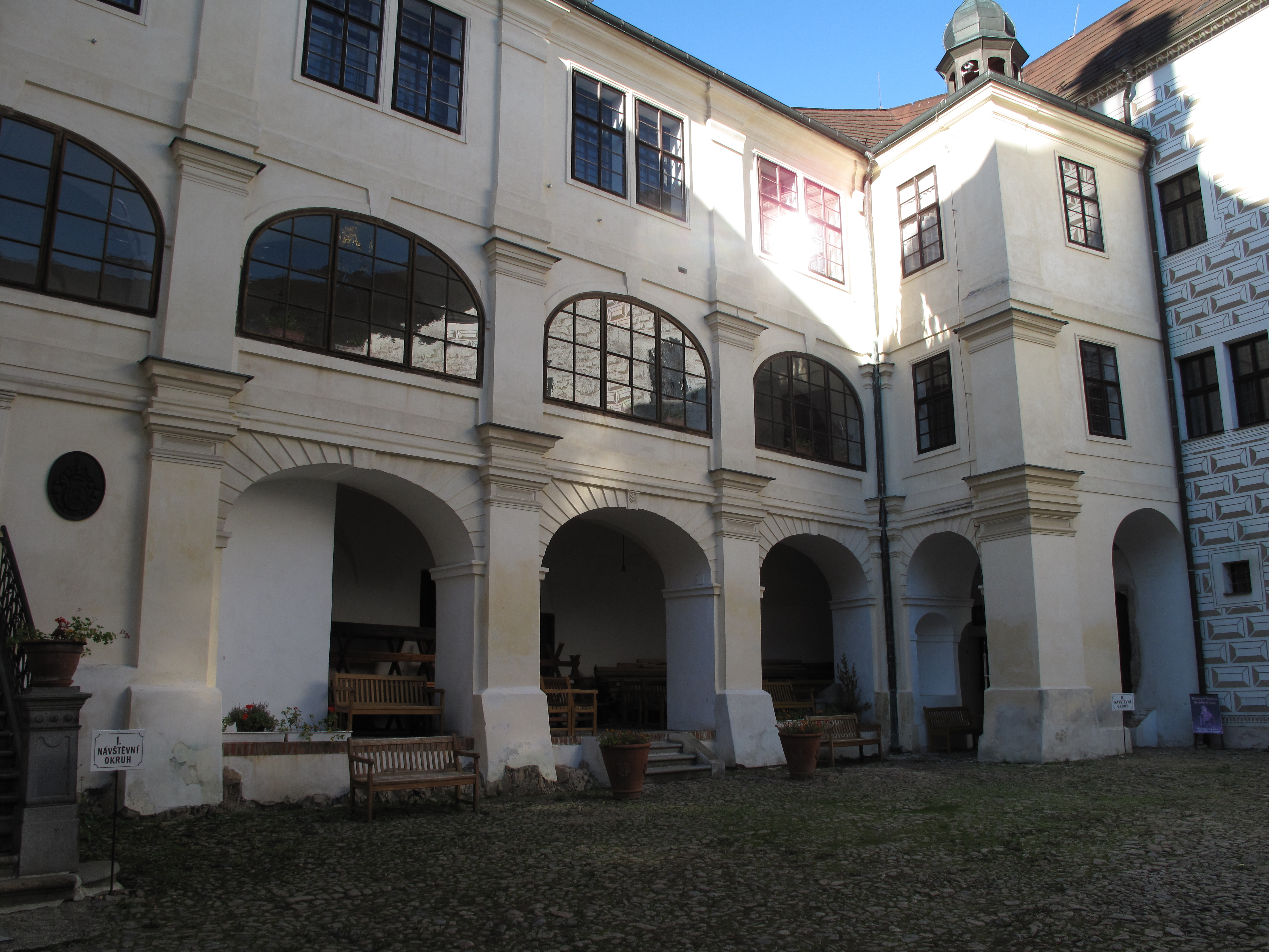 Zámek v Březnici. Okres Příbram, Česká republika.